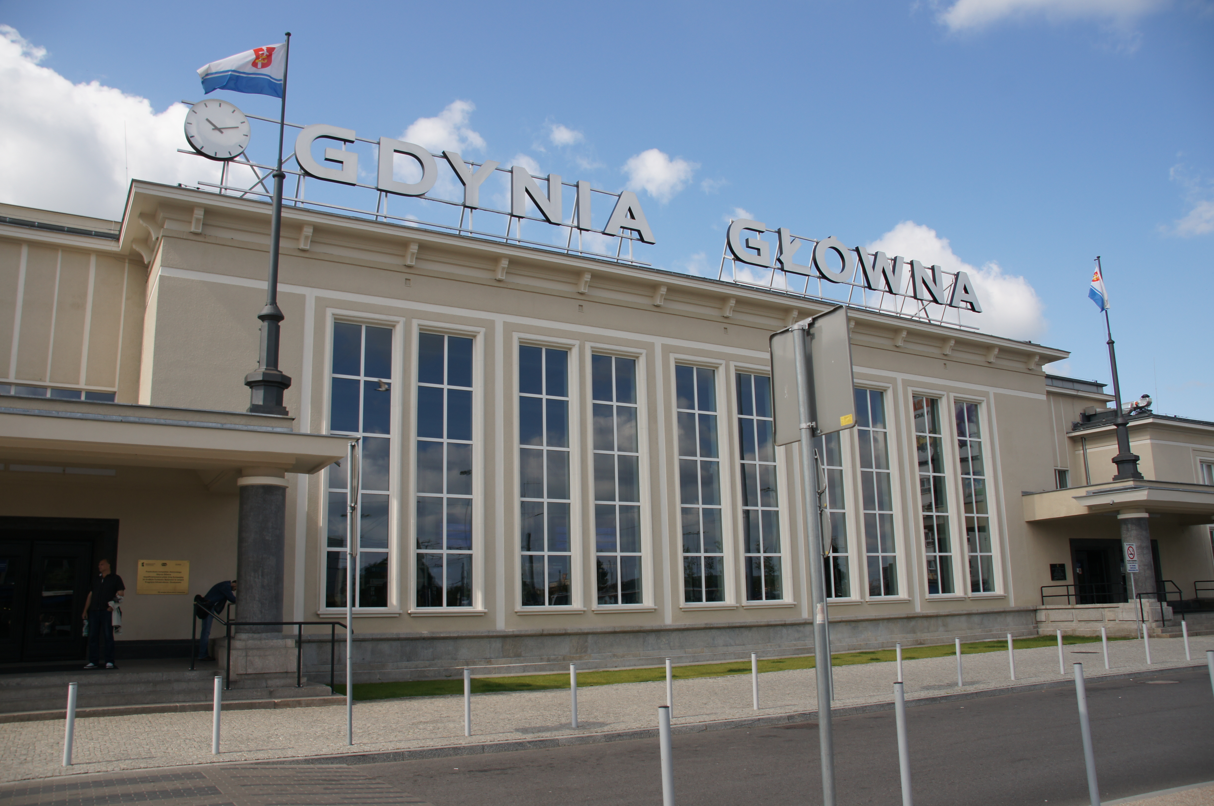 Gdynia, zespół dworca kolejowego, 1950-1959